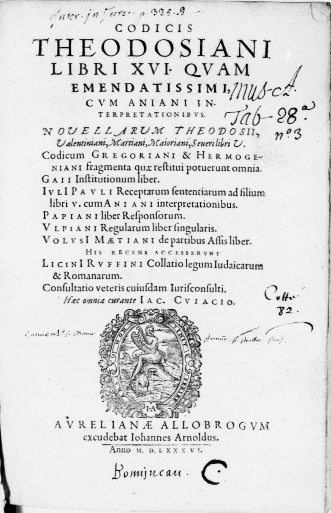 Frontespizio